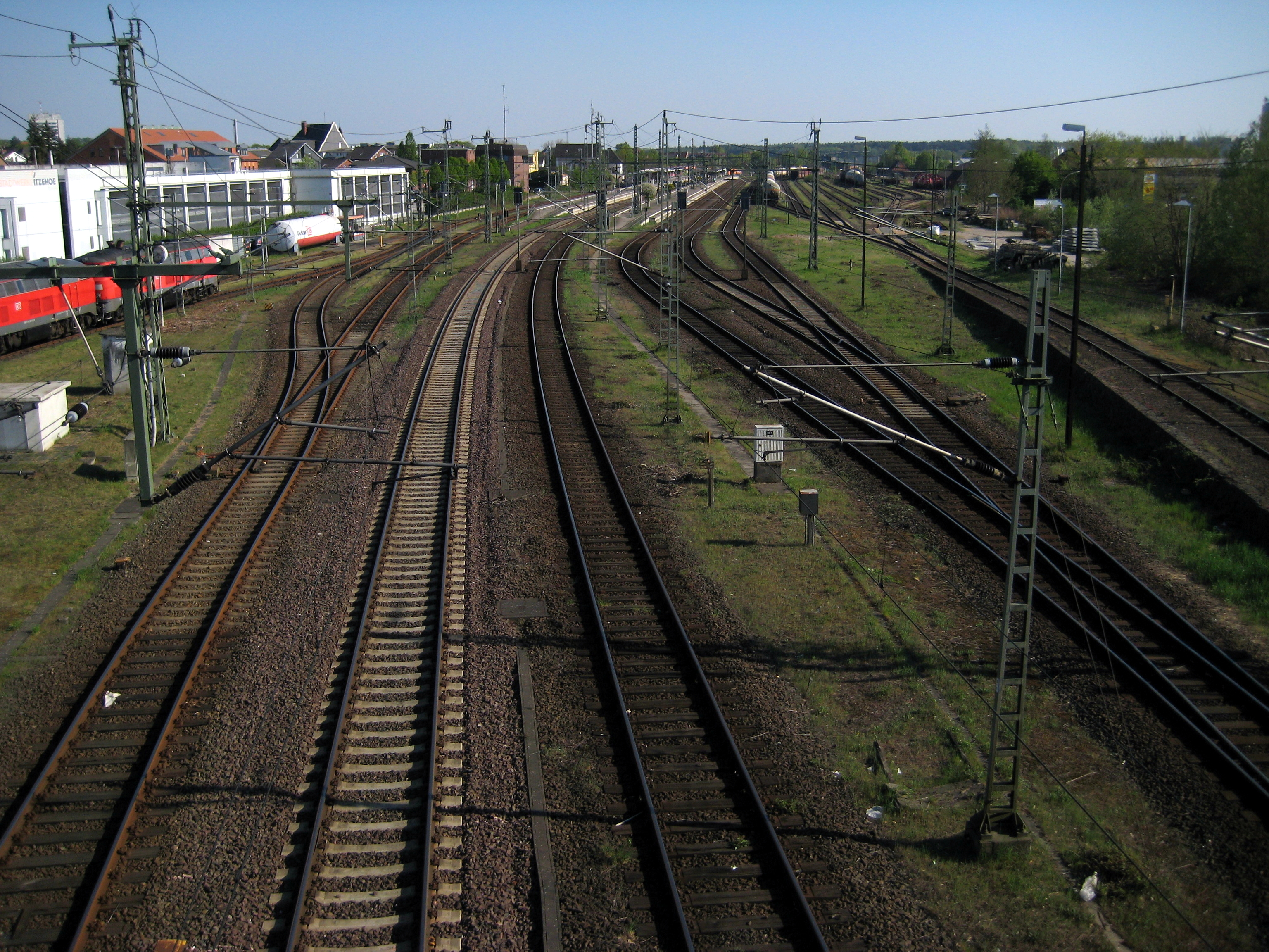 Bahnhof Itzehoe, links die Tankstelle auf dem ehemaligen Bahnbetriebswerk, rechts der Ablaufberg